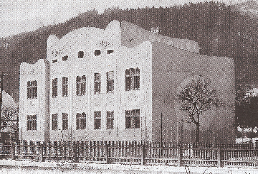 Der Erlafhof in Scheibbs, heute Traunfellner, damals ein expressionistischer Jugendstilbau, heute überformt